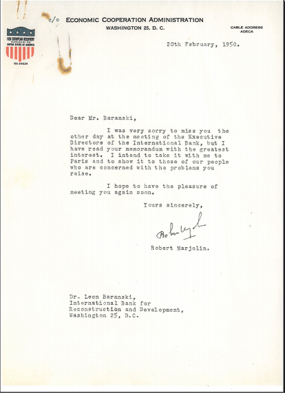 List wysłany do Leona Baranskiego przez Roberta Marjolin'a w lutym 1950 roku.